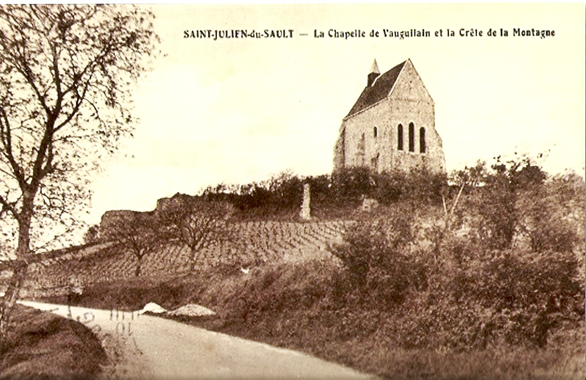 Il s'agit de la vigne avant le passage du Phylloxera fin 19e début 20e et la Chapelle avant la reconstruction de la muraille du château.